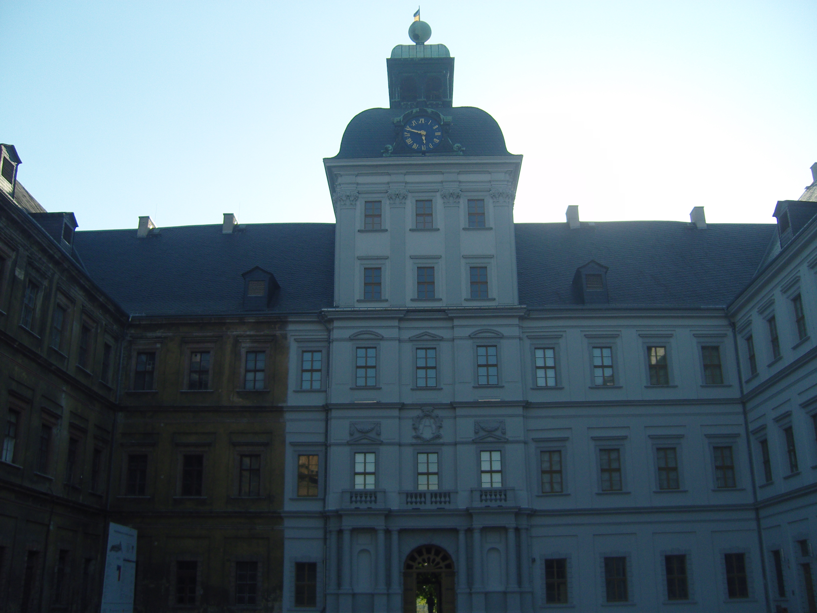 Schloss Neu-Augustusburg